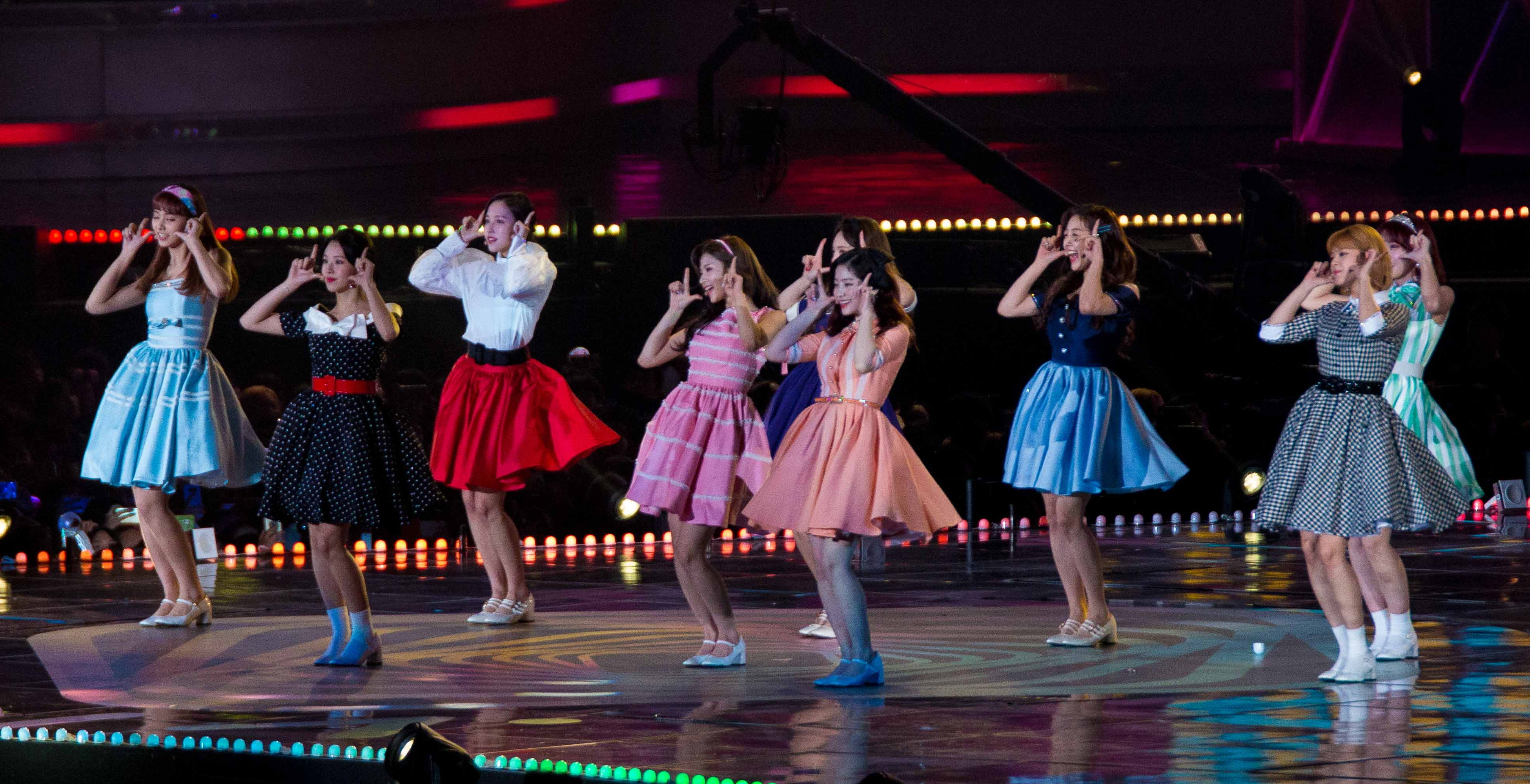 20171202 트와이스 멜론뮤직어워드